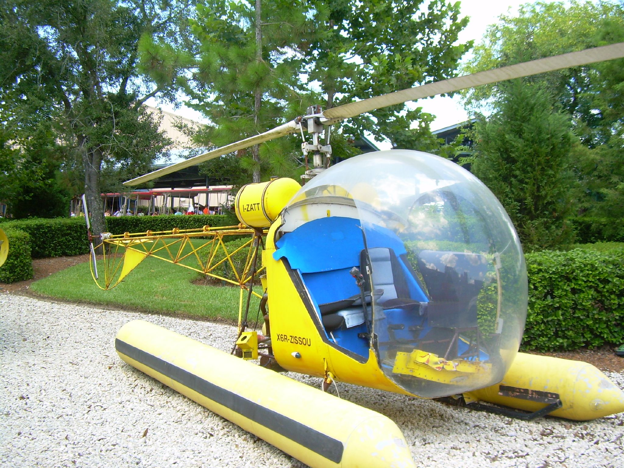 Zissou Helicopter